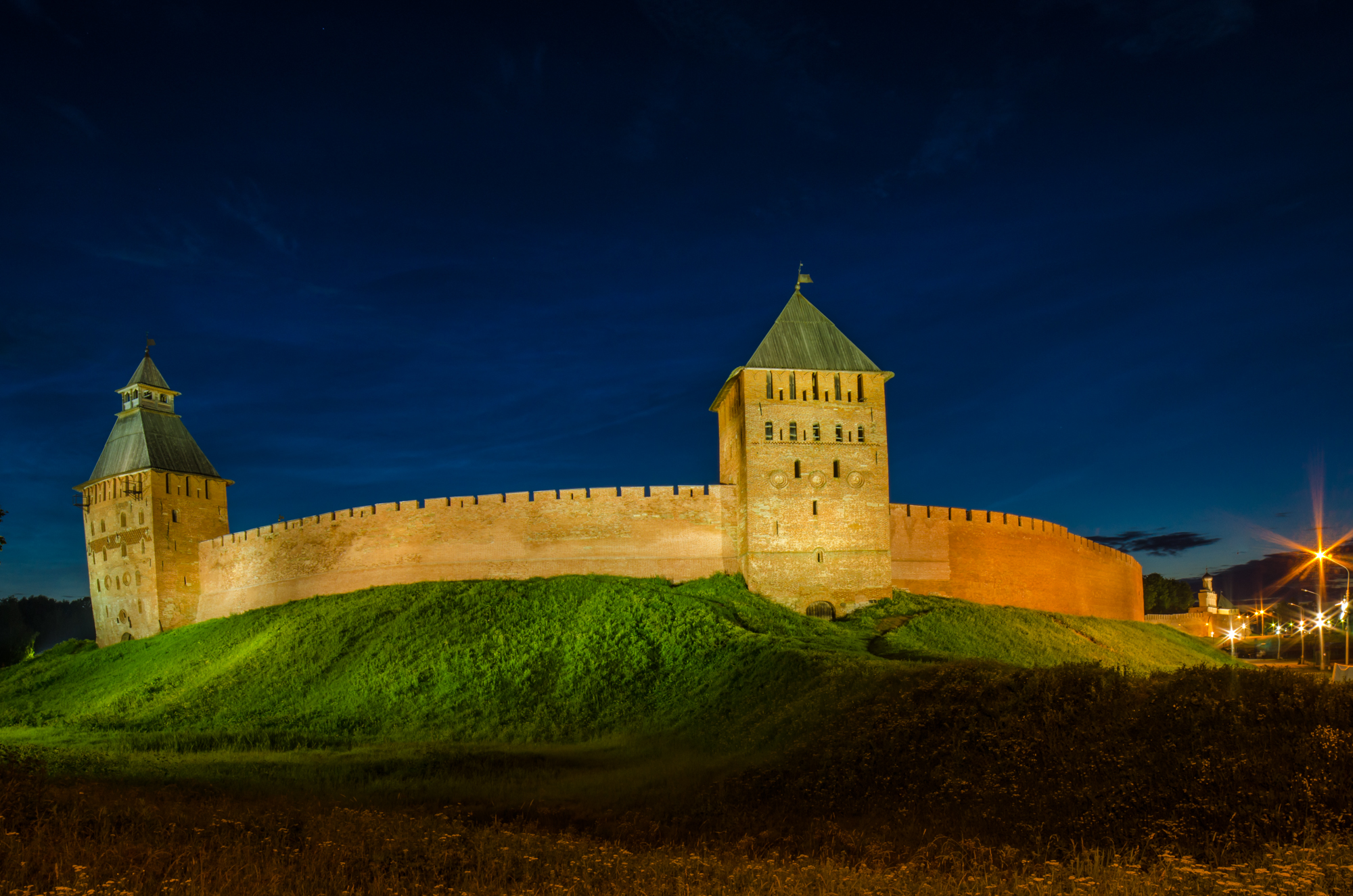 Прясло стены между башнями Спасской и Дворцовой: Великий Новгород, Новгородская область